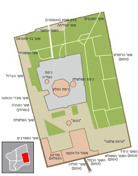 מפת הר הבית